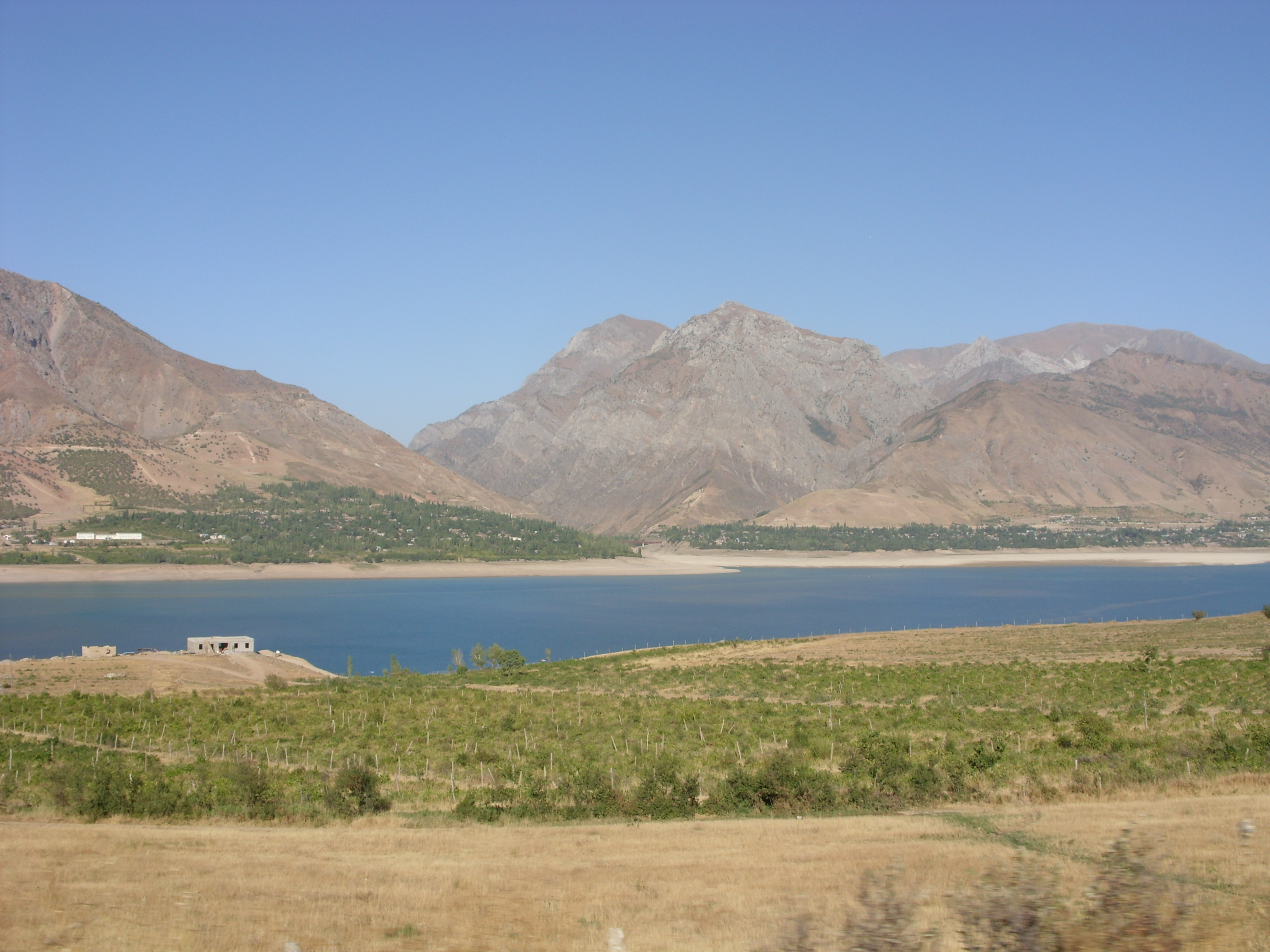 вид на посёлок Бричмулла, расположенный на берегу Чарвакского водохранилища в Узбекистане